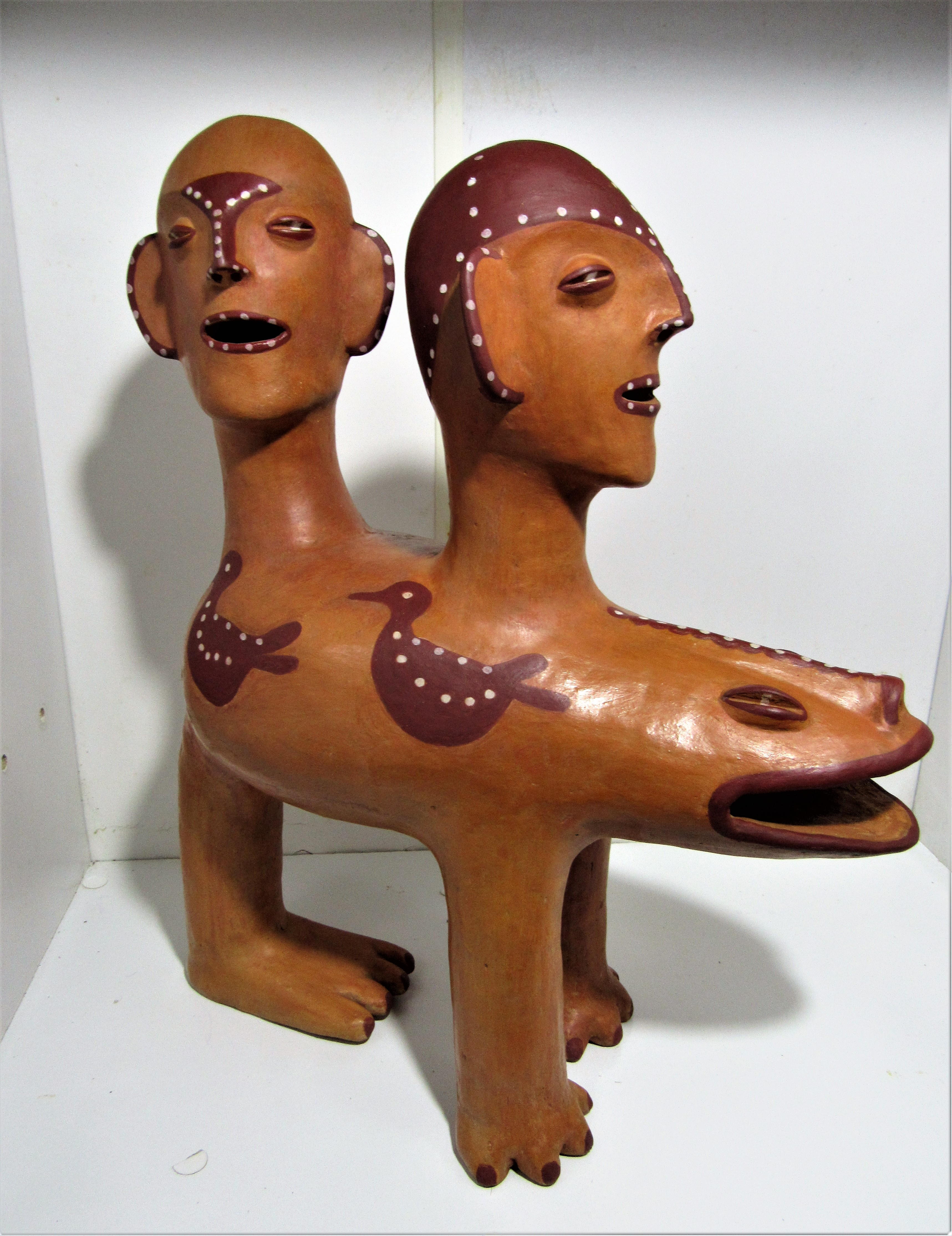 Obra do artista popular Ulisses Pereira Chaves, já falecido, a obra foi feita em 1982. Na cabeça humanoide posterior, falta um adorno.